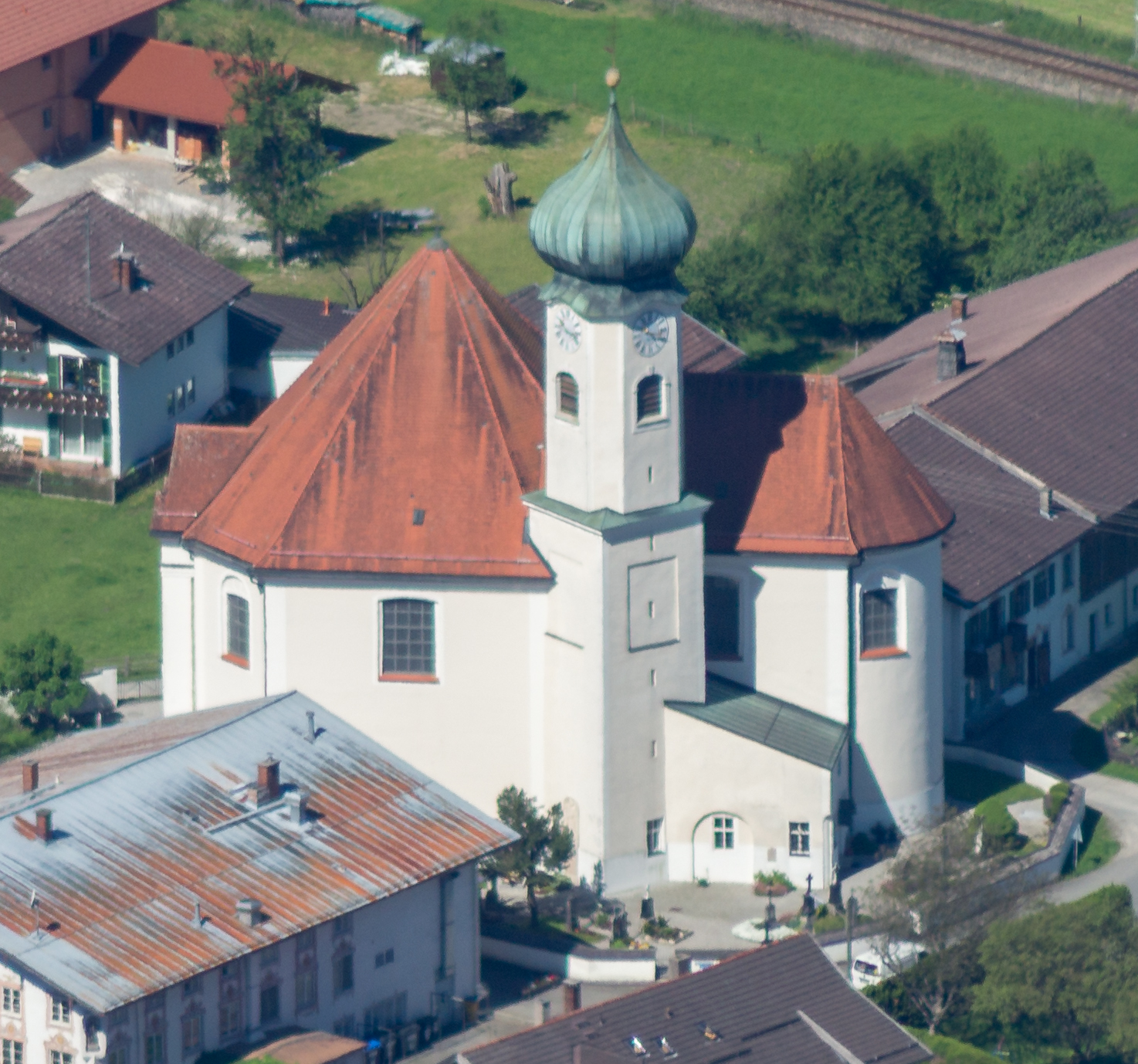 Blick von der Osterfeuerspitze auf den Eschenloher Ortskern.